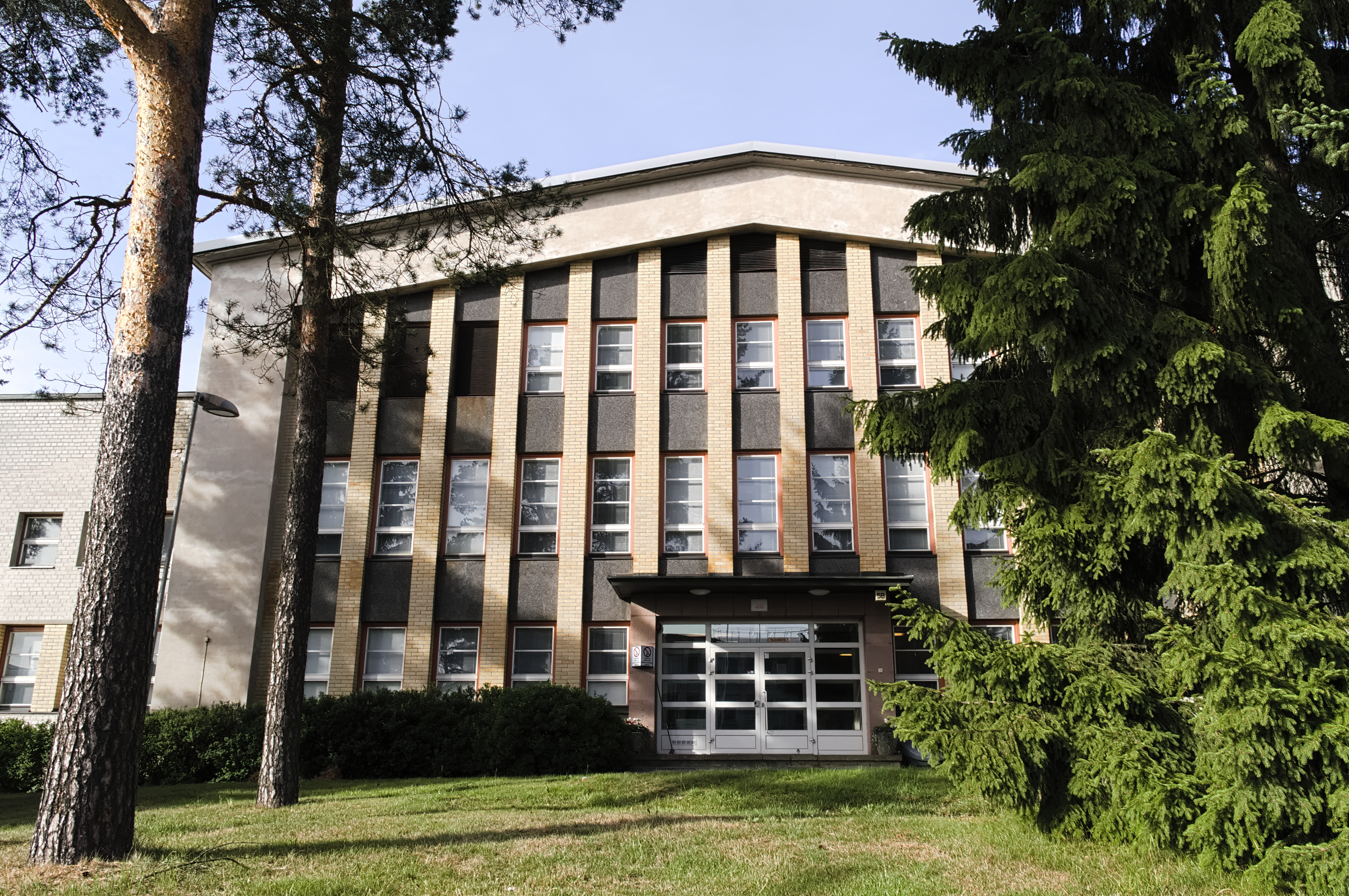 Strömbergin teollisuusalueen vanhan liesitehtaan julkisivua